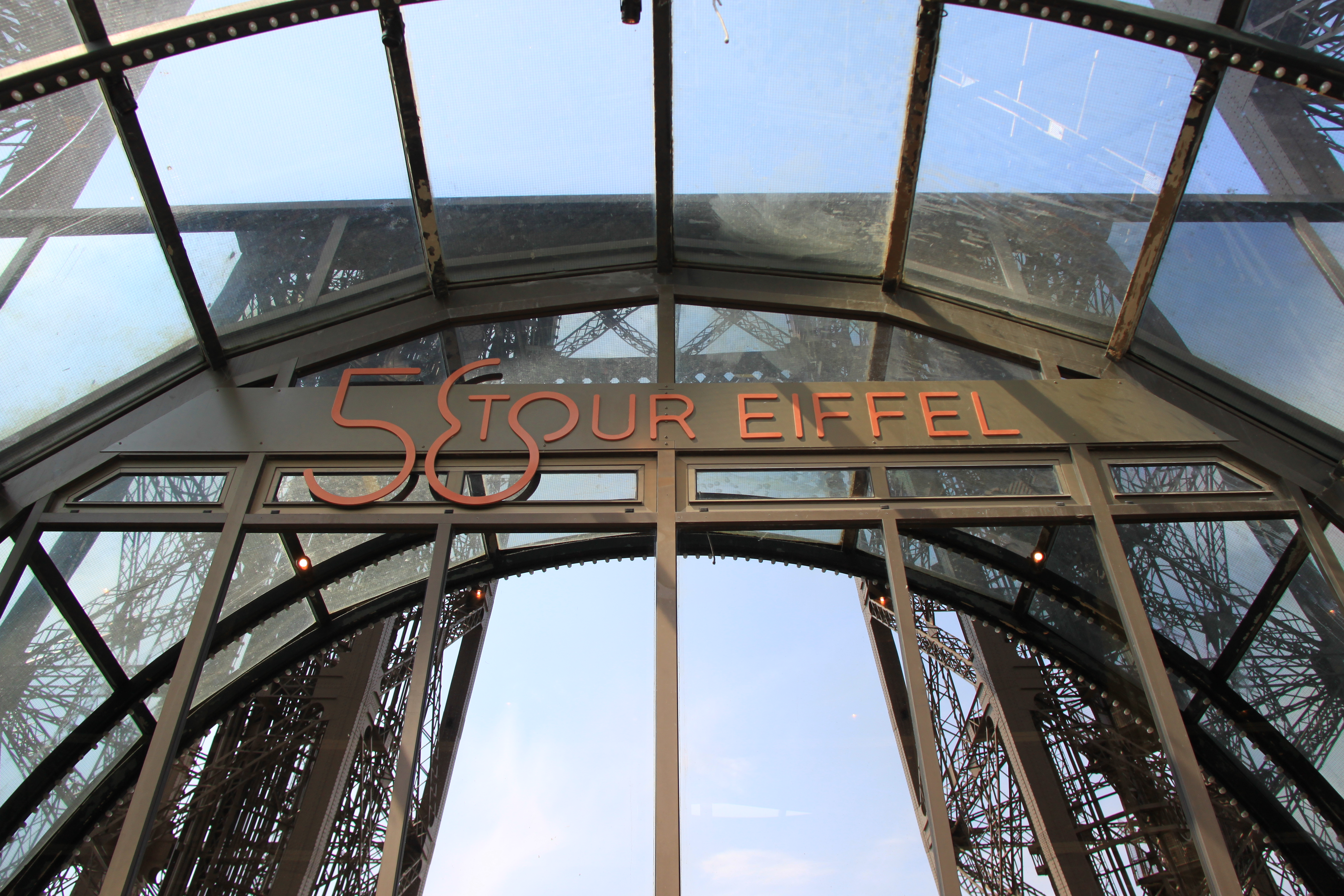 58 Tour Eiffel restaurant, Paris.